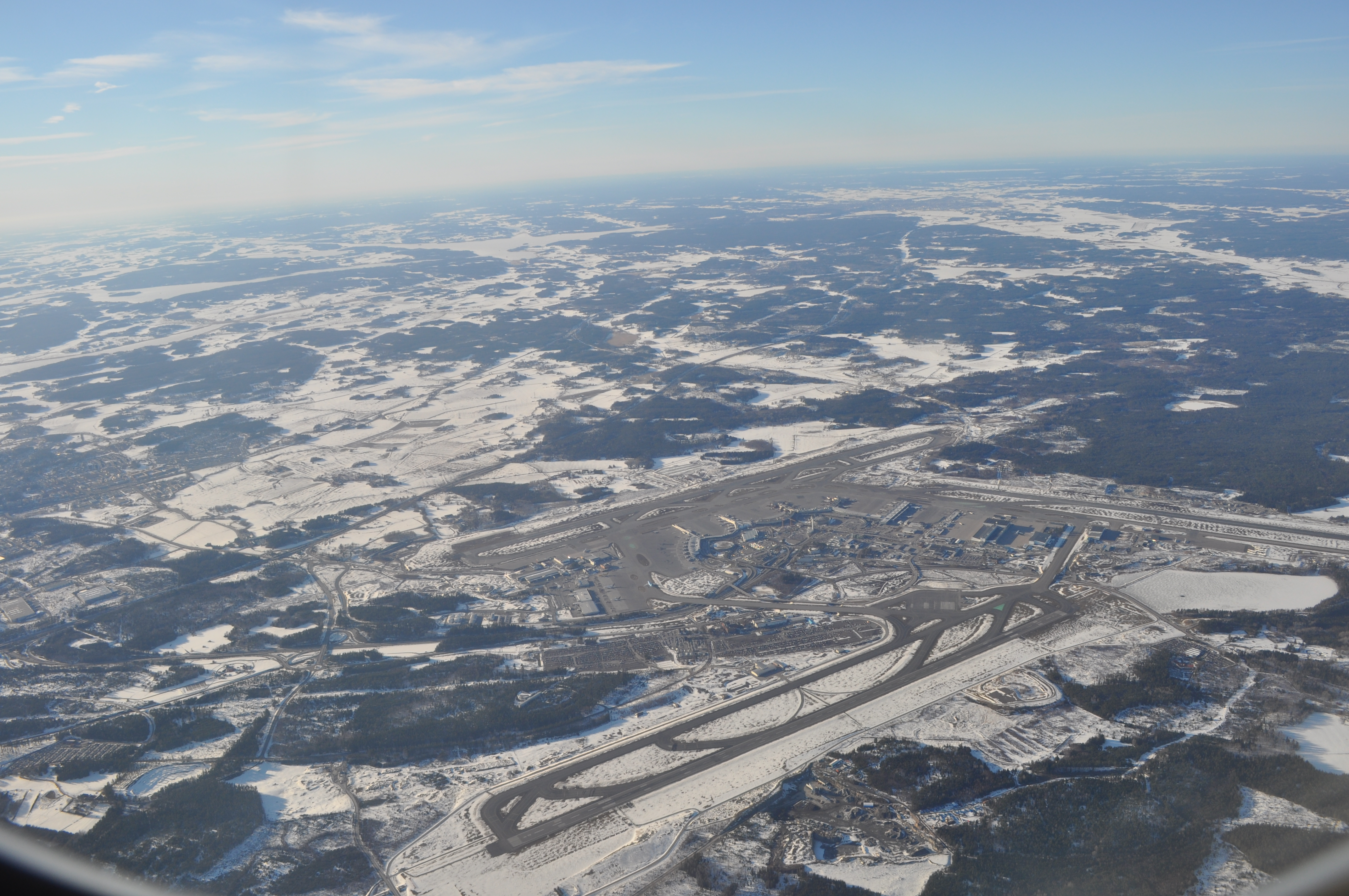 Flugplatz Arlanda aus der Luft